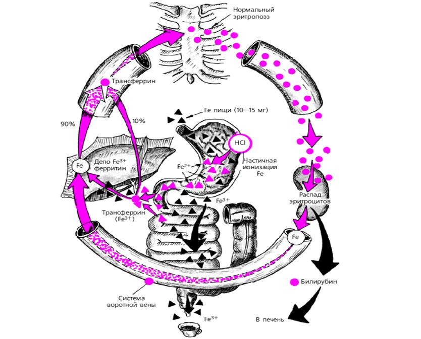 Адам ағзасындағы темір алмасу жобасы